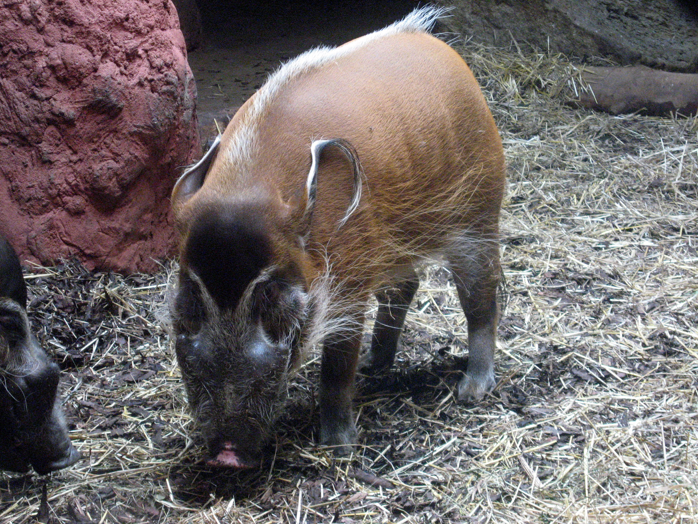 Štětkoun africký